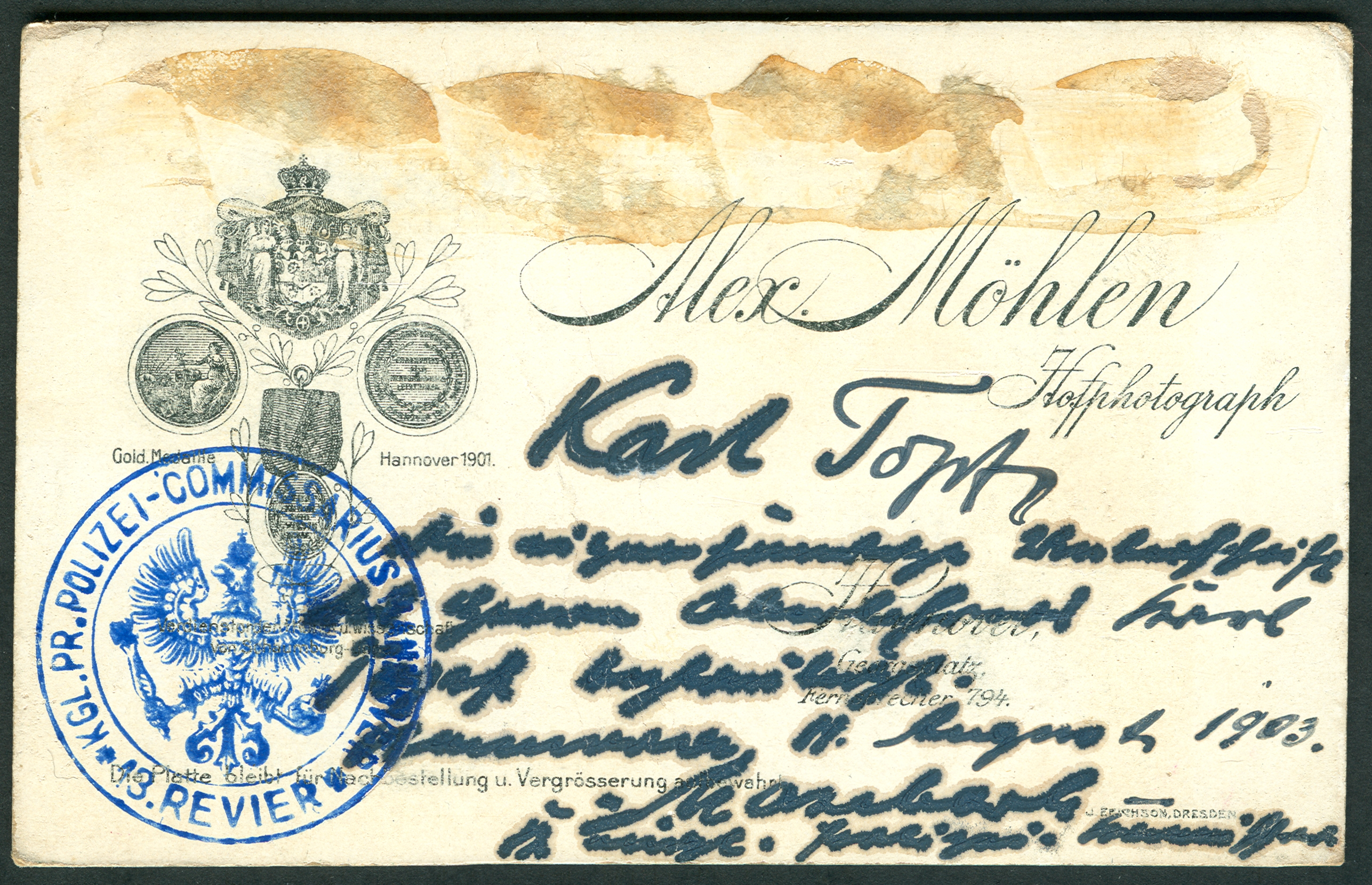 Rückseite der Carte de Visite, handschriftlich und einigermaßen unleserlich beschrieben von Karl Toptz (?), königlich preussischer Polizei-Kommissar in Hannover, 13. Revier